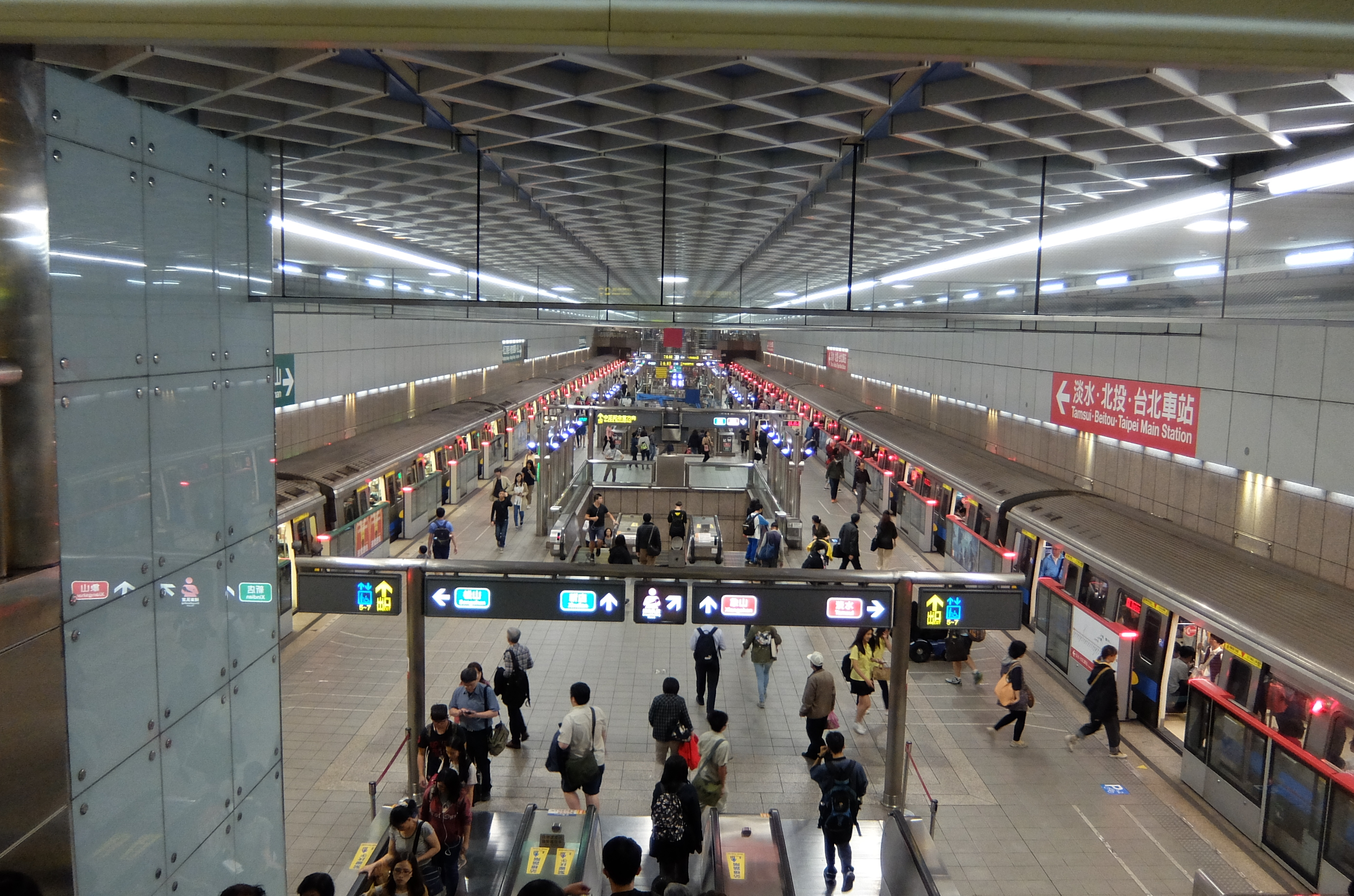 대만여행 59